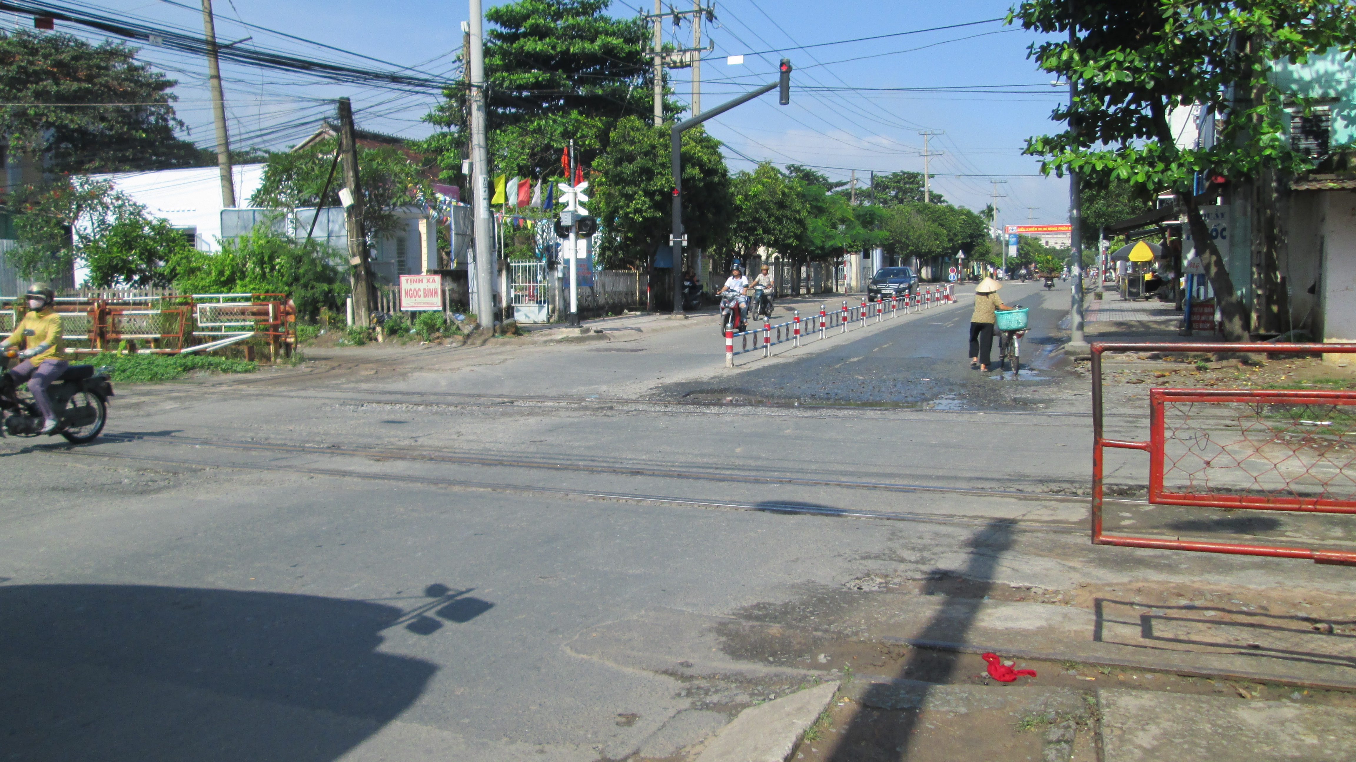 Đường Lý Thường Kiệt, thị xã Dĩ An